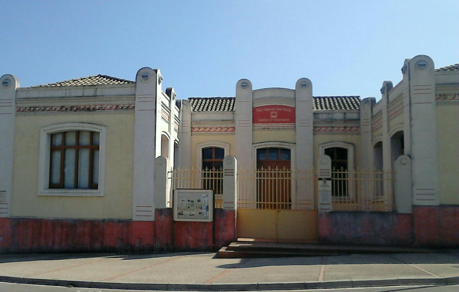 Antic Escorxador de Roquetes, ubicat a l'Avinguda de la Vall de Safán, s/n. Actualment funciona com a Centre de Visitants i Seu Administrativa del Parc Natural dels Ports.